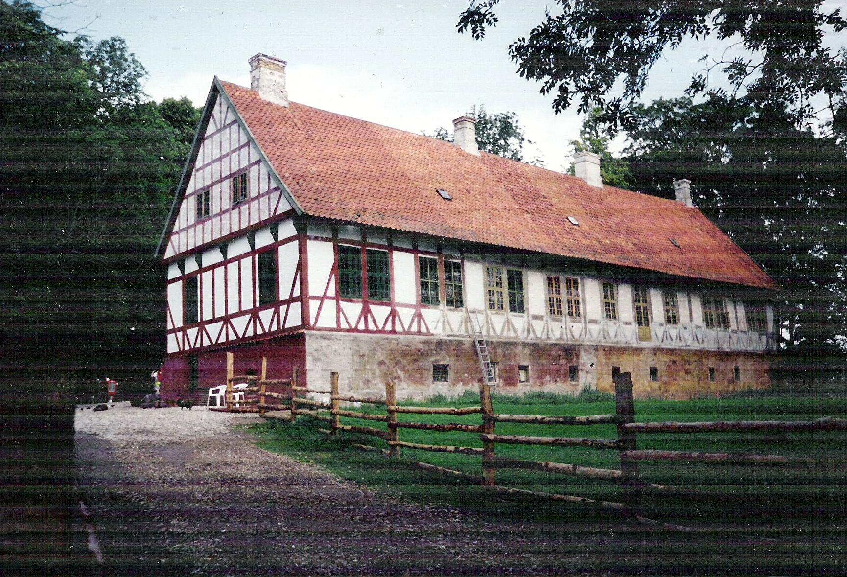 Oregaard på Fyn.